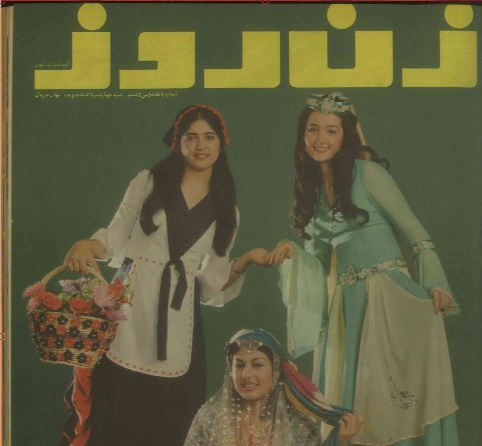 مجله زن روز شماره 536 مرداد 1354